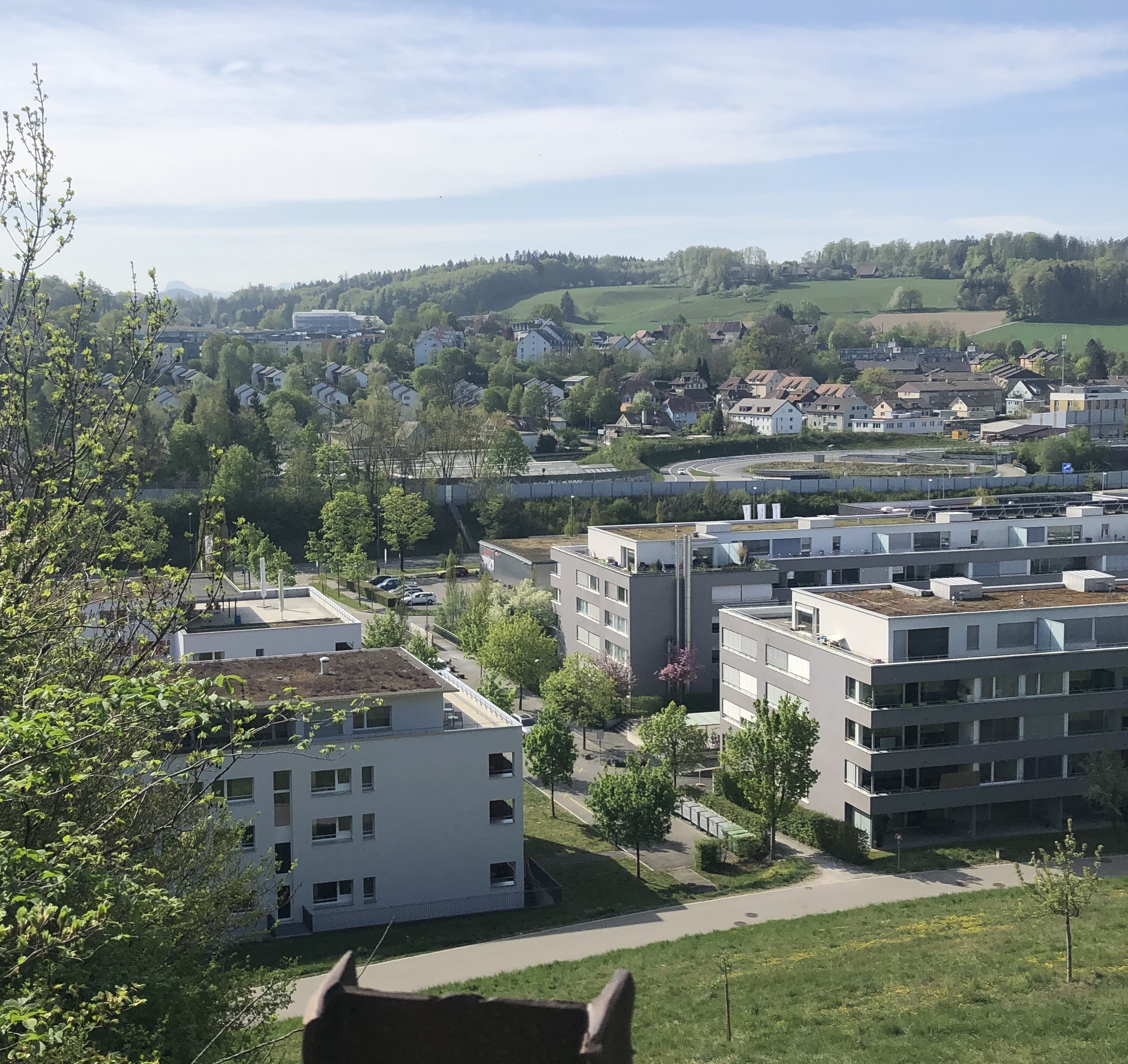 Blick von Rehhag nach Hohliebe (links oberer Teil)